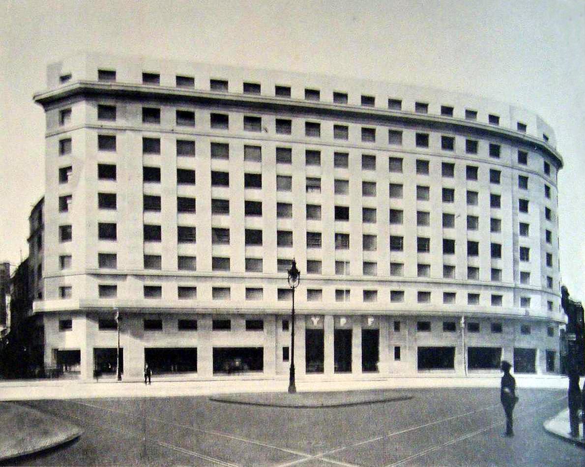 Edificio de Yacimientos Carboníferos Fiscales (YPF), empresa estatal de hidrocarburos de la República Argentina, hoy en manos de la española Repsol. Diagonal Norte (Av. Roque Sáenz Peña) entre Maipú y Tte. Gral. Juan D. Perón. Barrio de San Nicolás, ciudad de Buenos Aires, Argentina